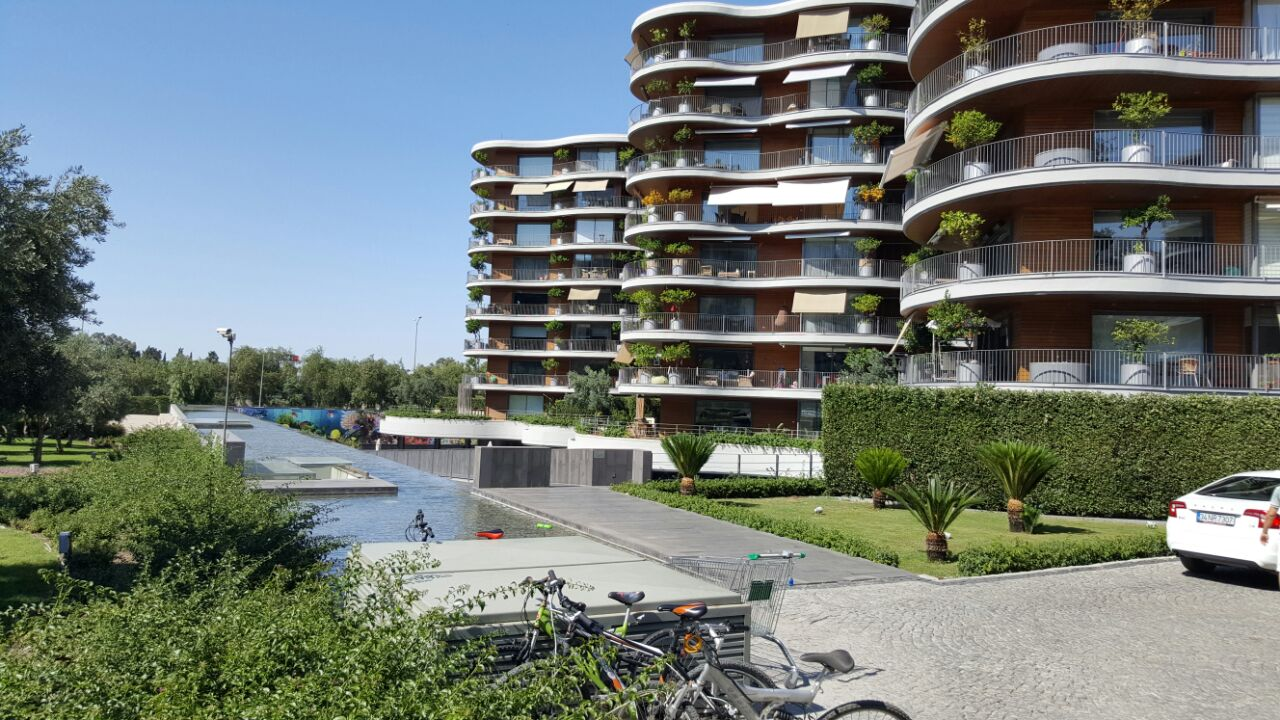 Folkart Narlıdere Residance